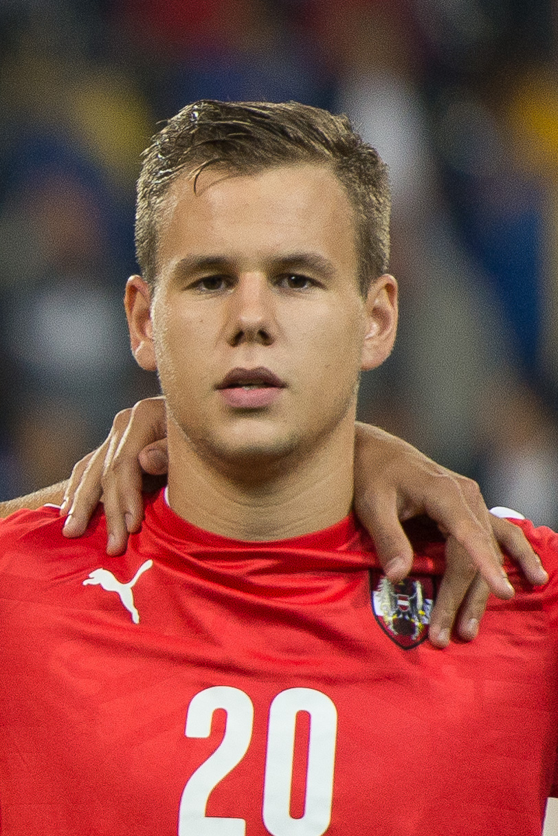 Fußball U21 EM-Qualifikation Österreich gegen Bosnien und Herzegowina St. Pölten, 5. September 2014 Louis Schaub